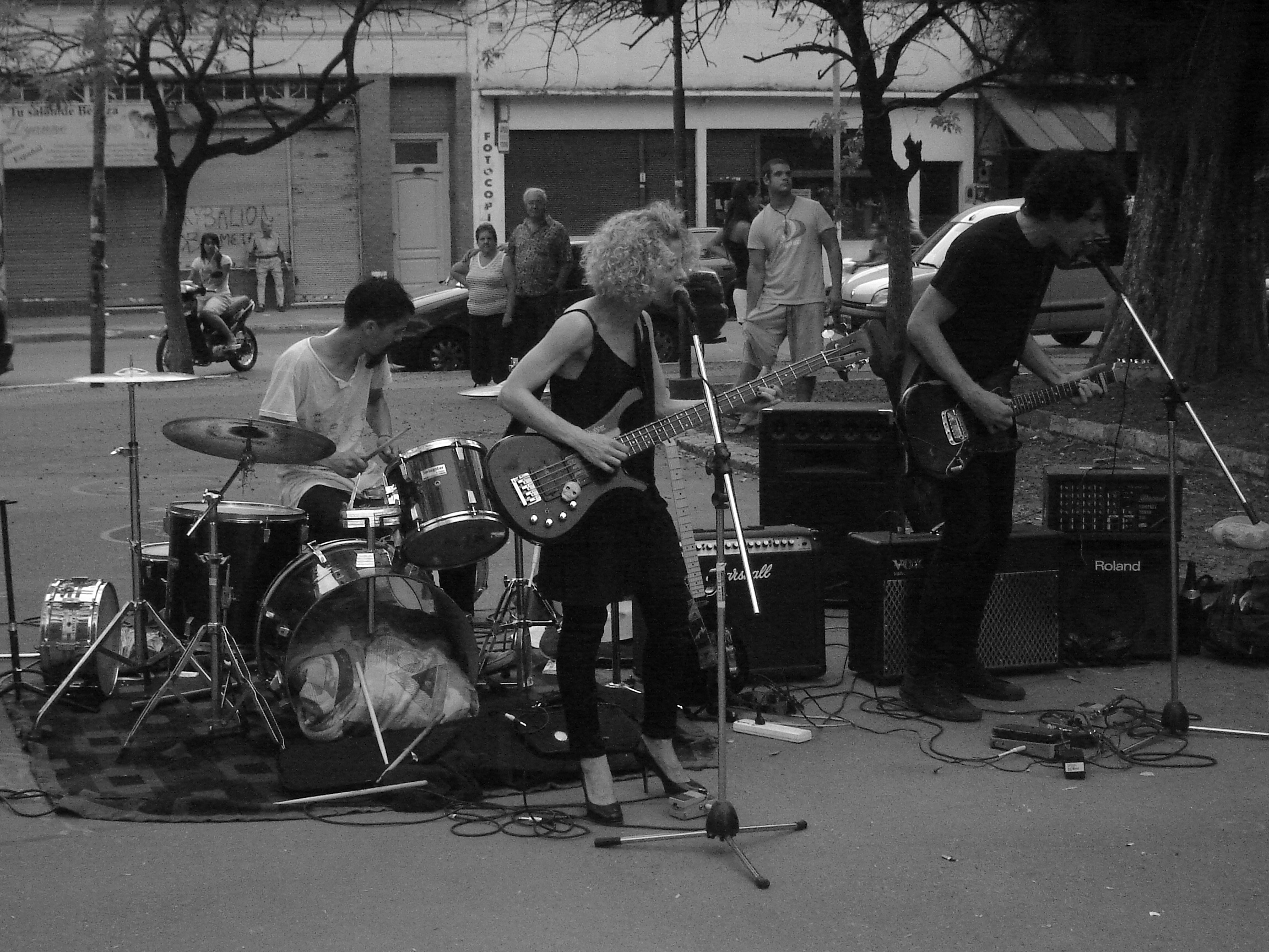 Mujercitas Terror, de izquierda a derecha: Federico Losa (Batería), Daniela Zahra (Bajo y voz) y Marcelo Moreyra (Guitarra y Voz) en el festival FREE CHABAN! Marzo del 2009.